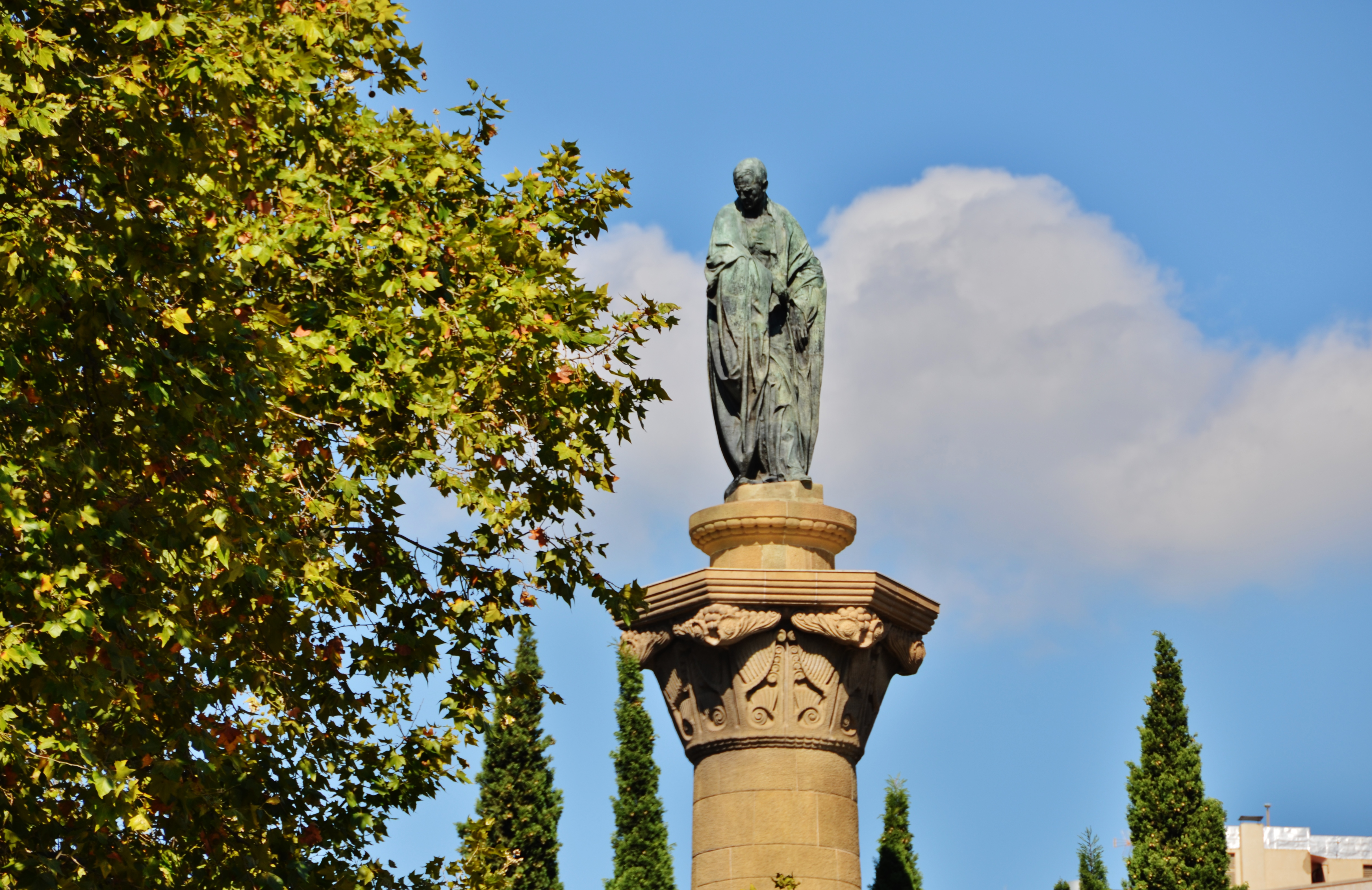 Monument a Mossèn Jacint Verdaguer (Barcelona)